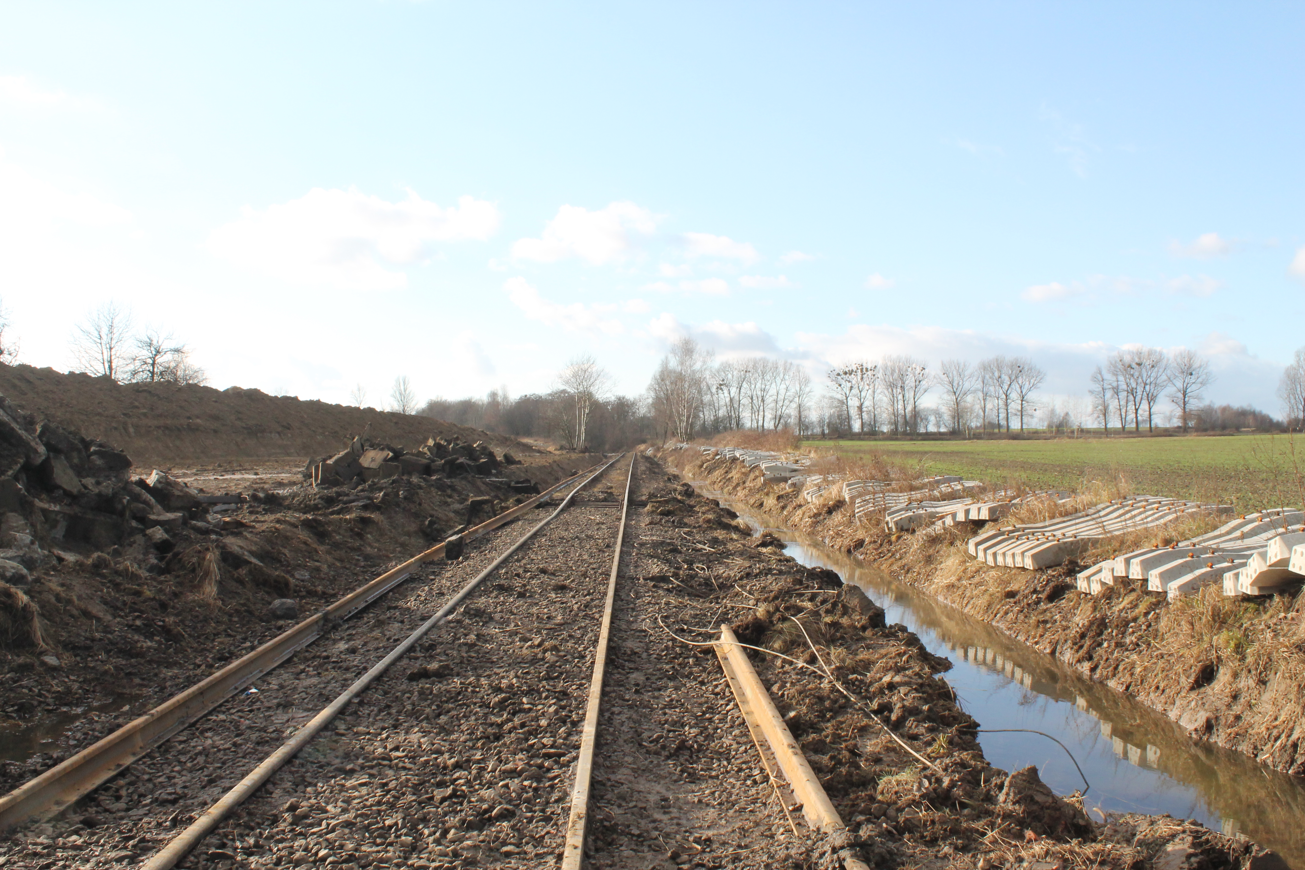 Rewitalizacja linii kolejowej nr 158. Grudzień 2014, Gorzyce